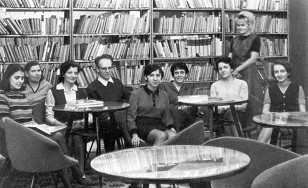 Kłodzko, pracownicy biblioteki